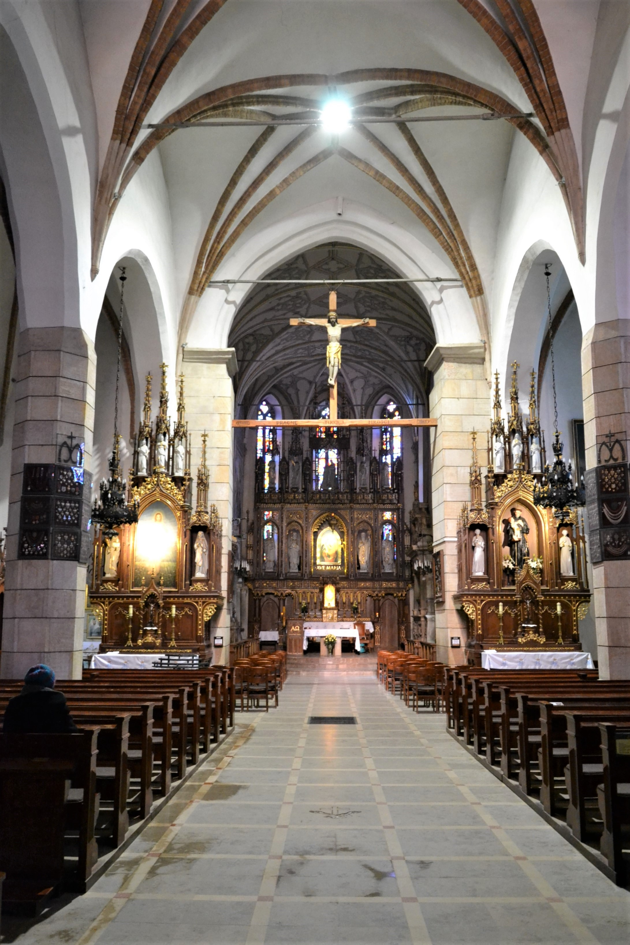 Wnętrze kościoła franciszkanów w Krośnie, XV-XVI w., regotycycowany w końcu XIX w.